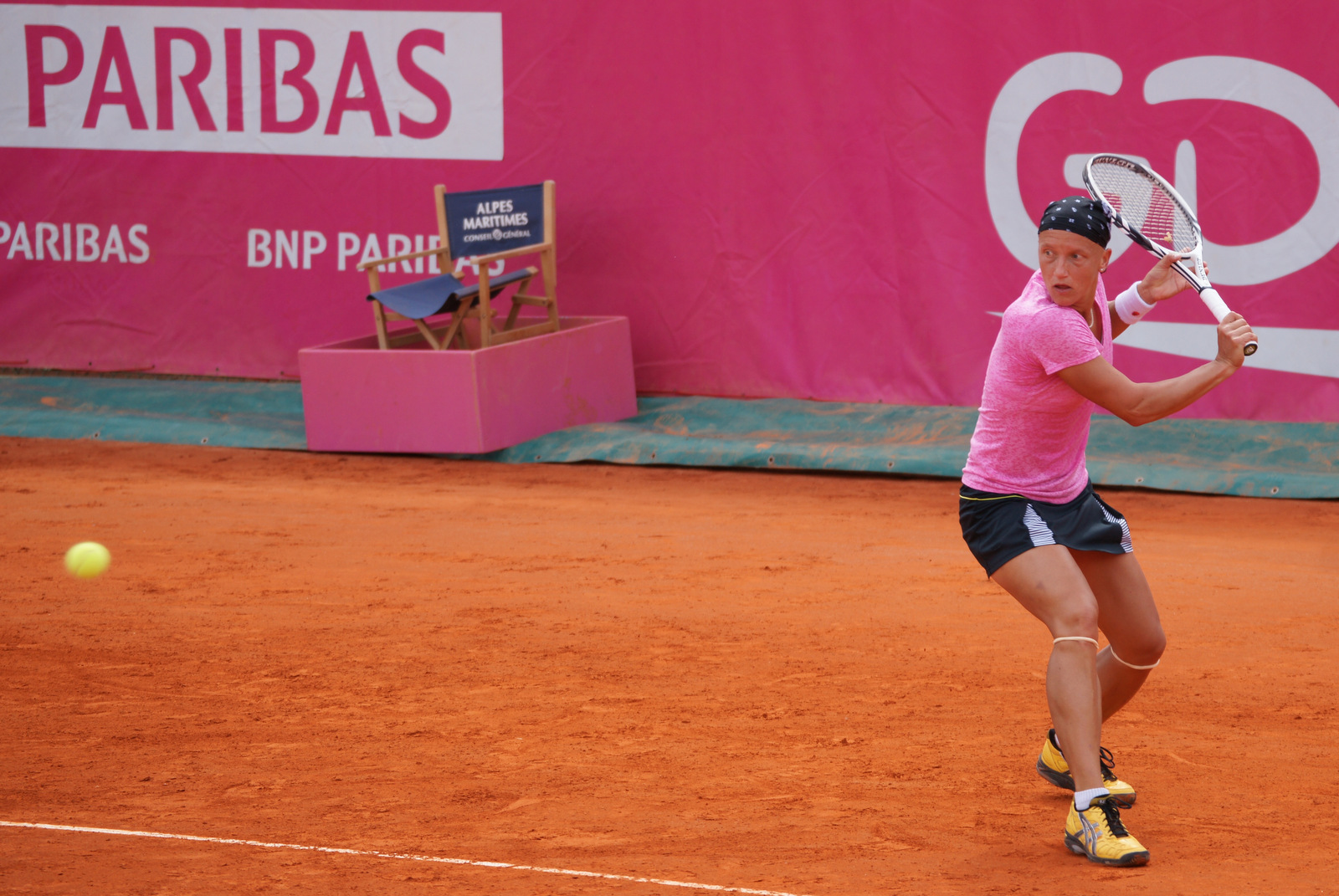 Petra Rampre, Open ITF Cagnes 2012